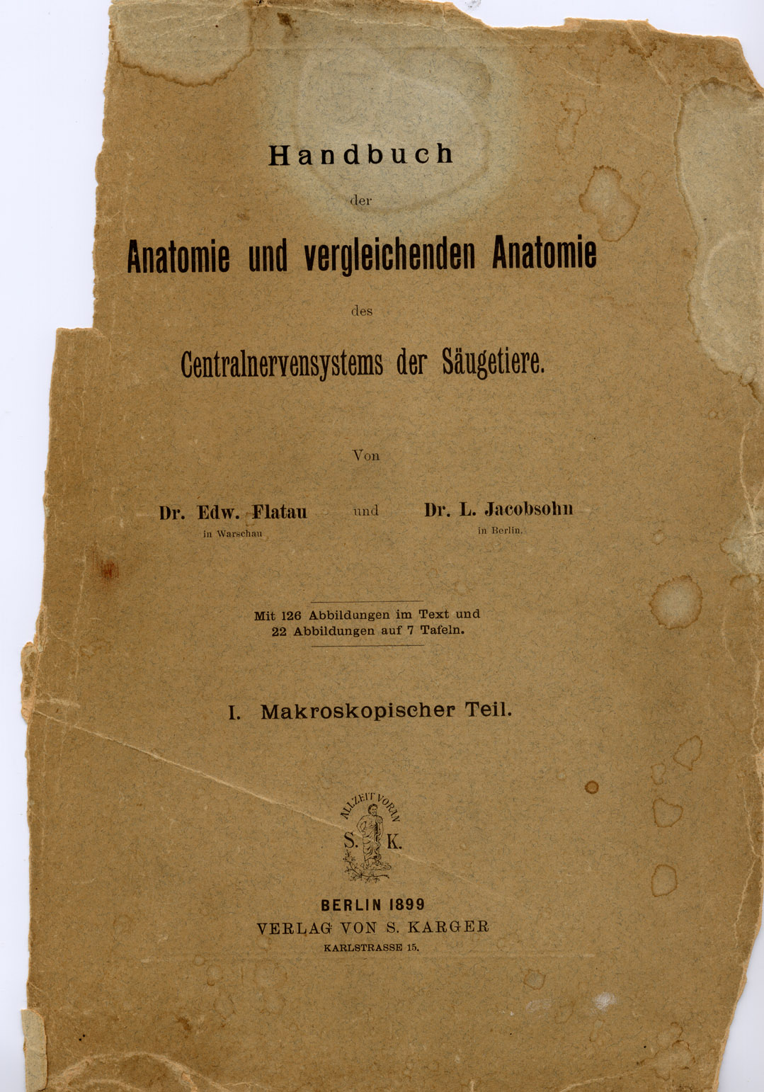 First page of the book by E. Flatau and L. Jacobsohn Handbuch der Anatomie und vergleichenden Anatomie. Verlag S. Krager, Berlin.